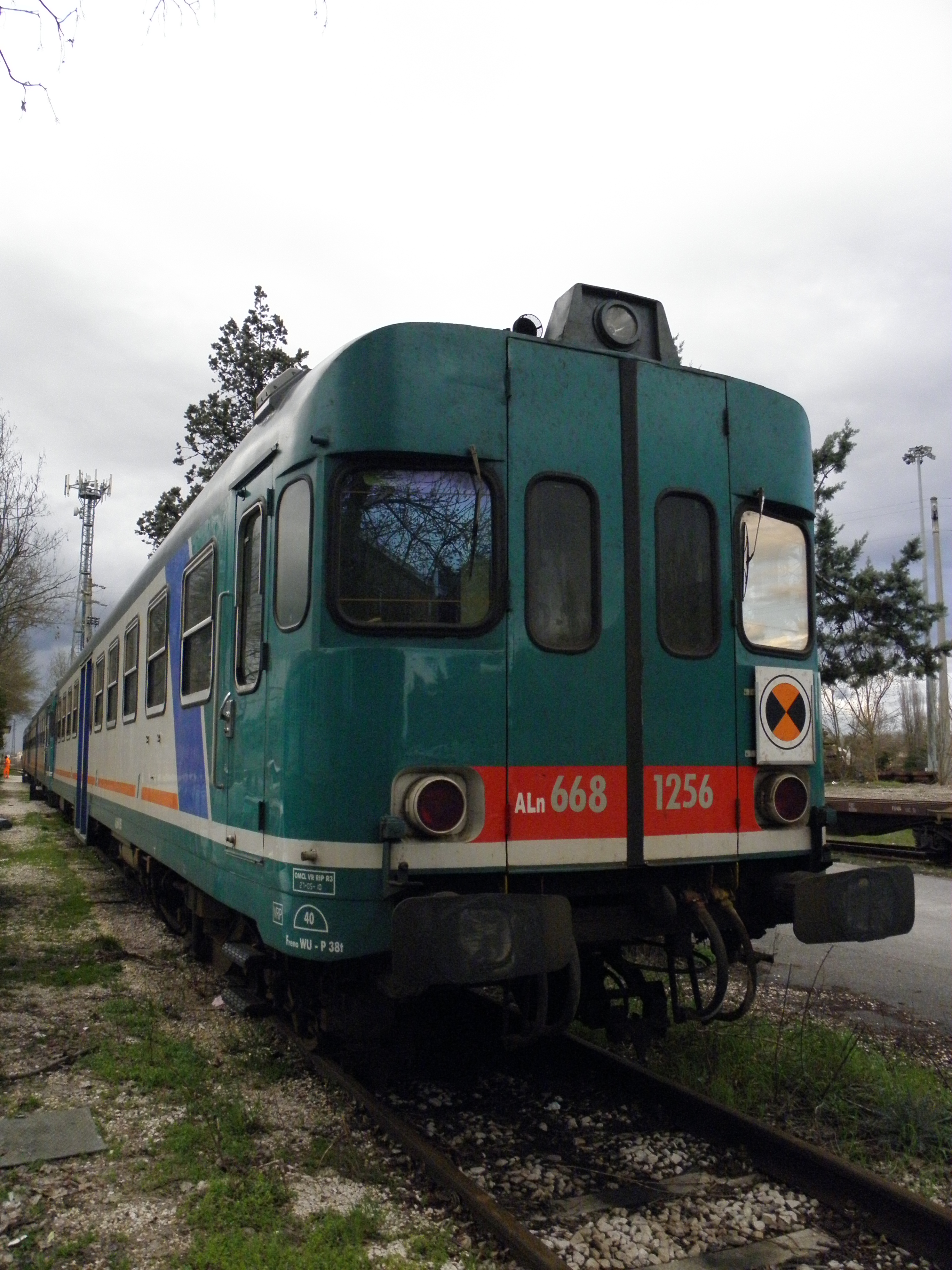 L'Automotrice ALn 668.1256 prodotta dalla Officine Meccaniche Calabresi (OMECA) in sosta nella stazione di Rovigo.